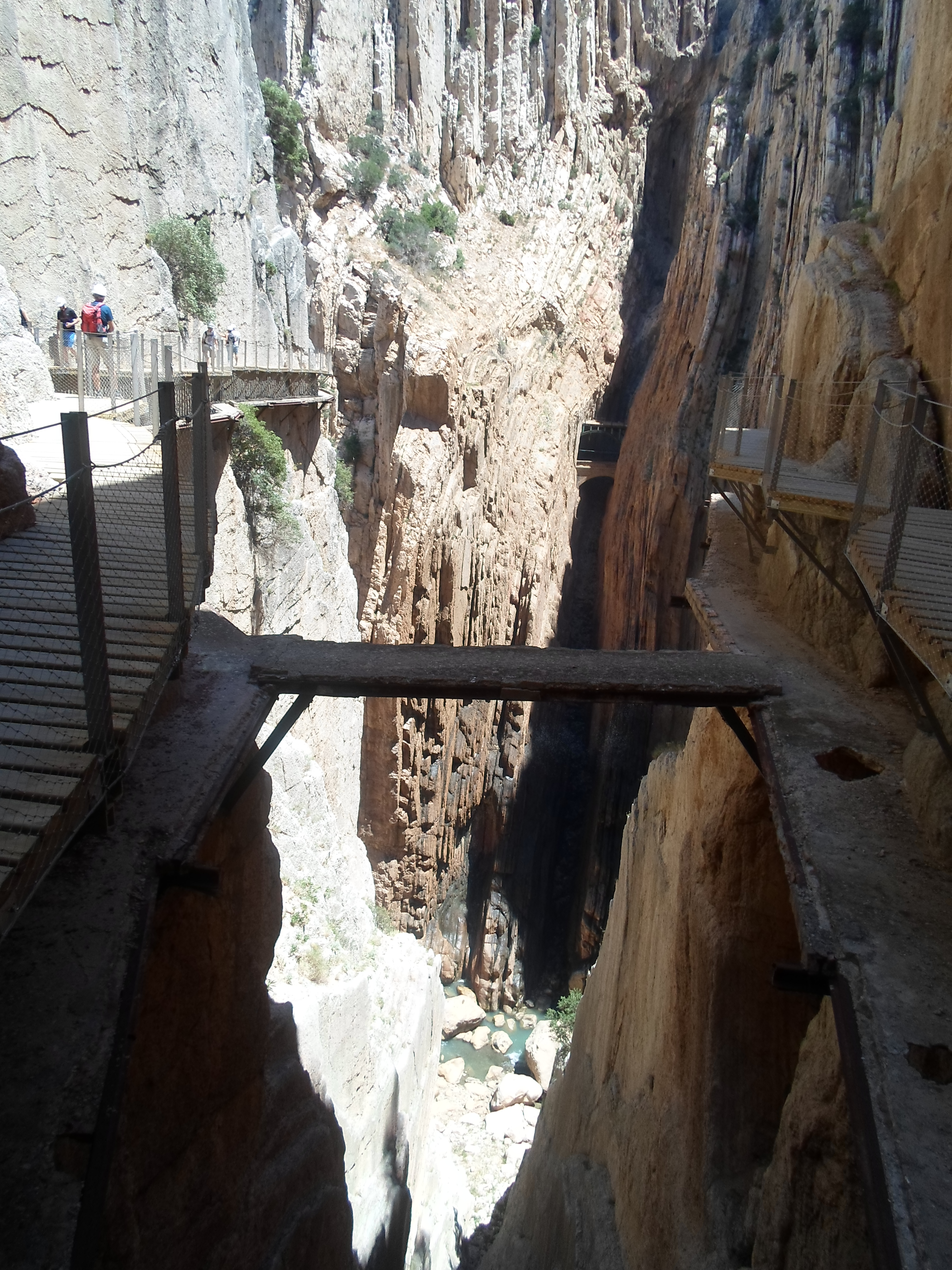 Vista con el caminito del rey viejo y el nuevo. Entre Álora y Ardales en Málaga España